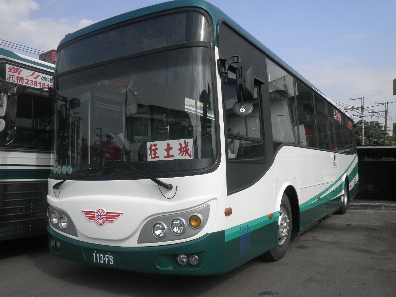 三重客運113FS 810線